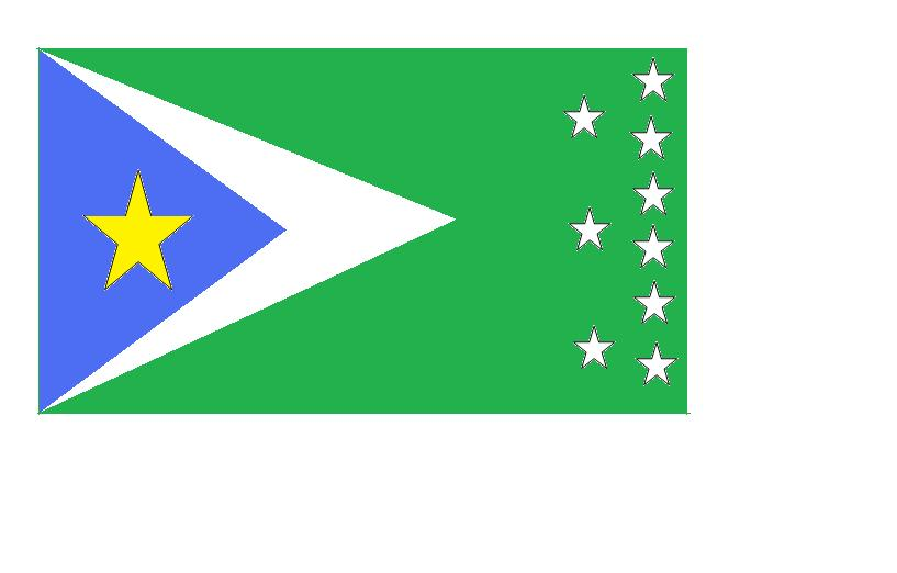 bueno aunque capitanejo es una simple parroquia es bueno que tenga su propia bandera de representación. aquí les dejo lo que podría ser quizás la futura bandera de la Parroquia más emblemática del Mun. Zamora